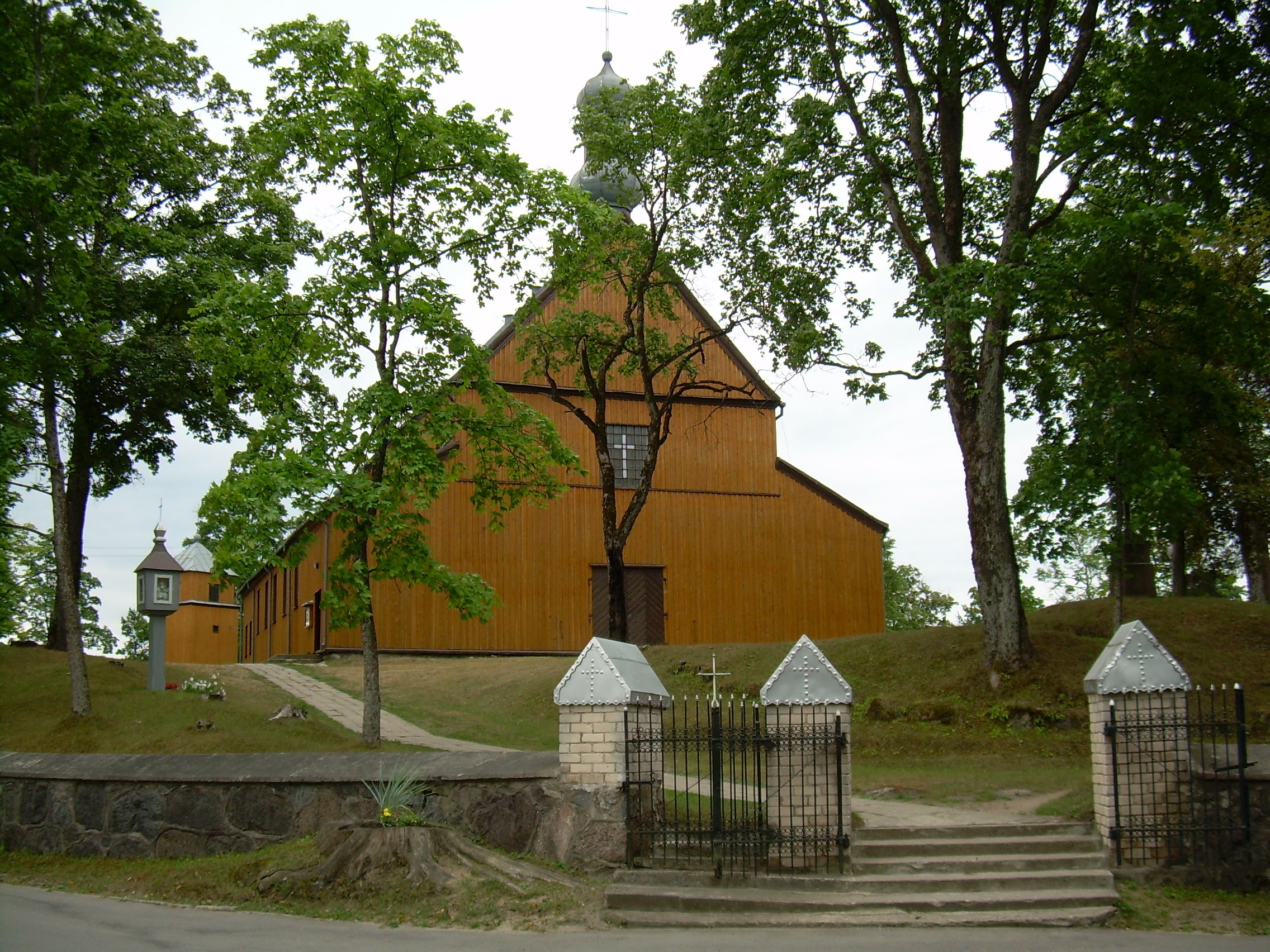 Alsėdžių Švč. Mergelės Marijos Nekaltojo Prasidėjimo bažnyčia